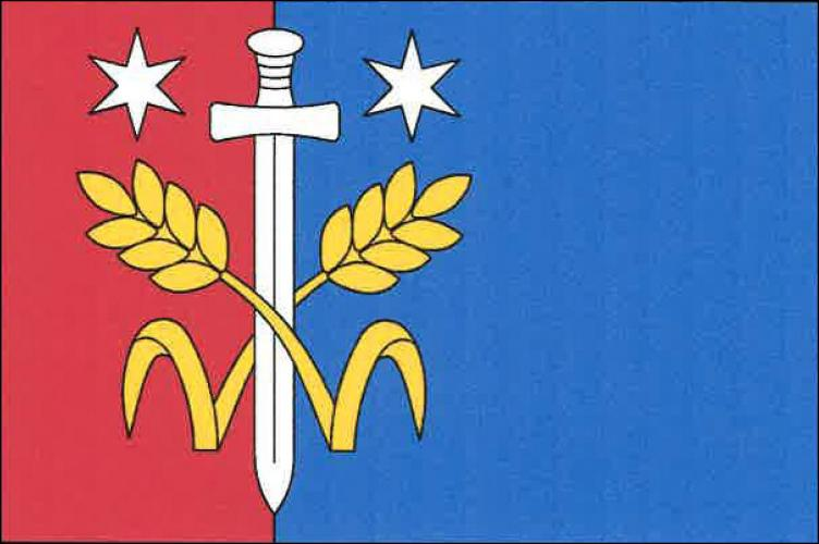 Třebovle vlajka